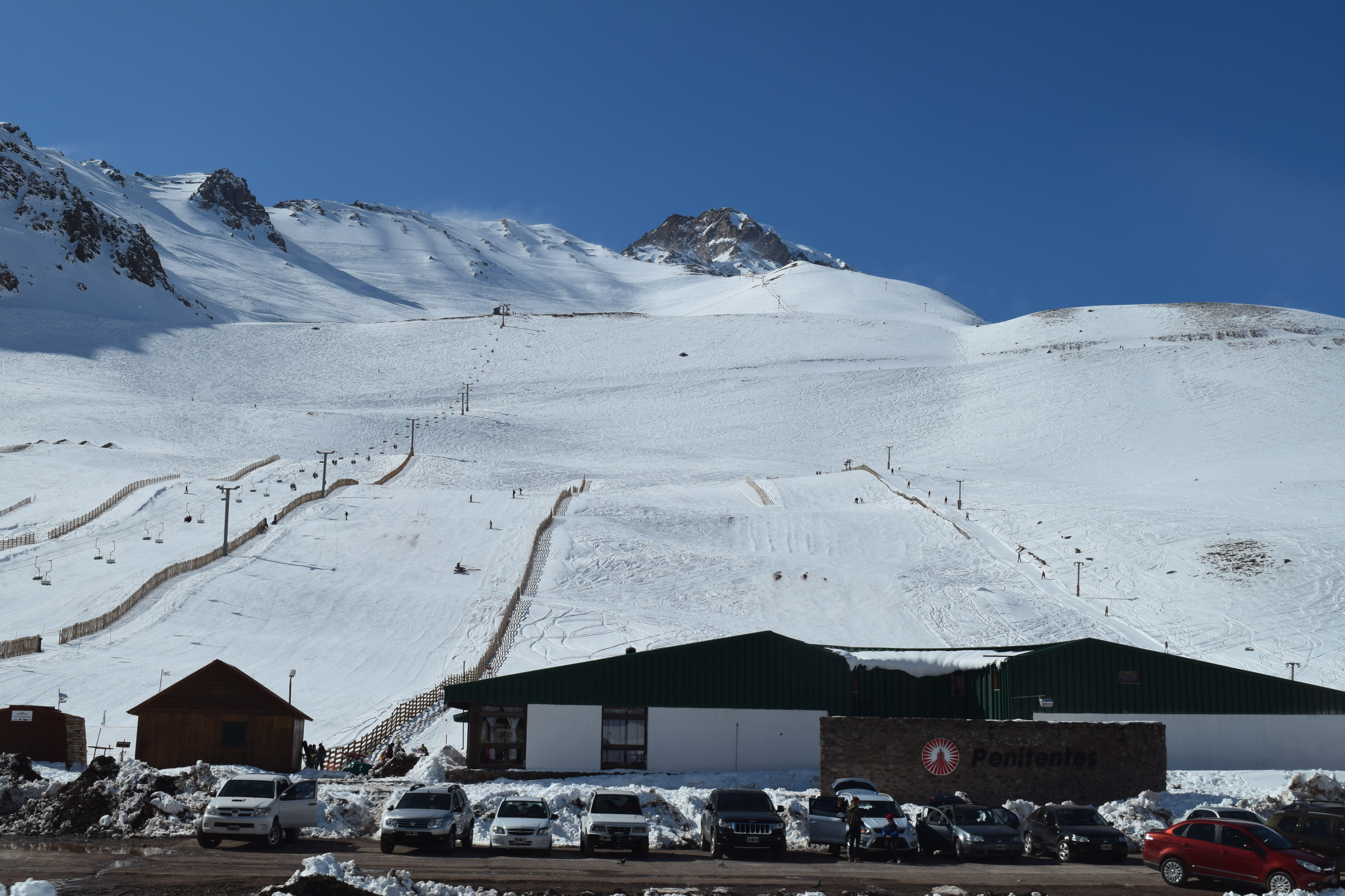 Centro de esquí de Los Penitentes, en la provincia de Mendoza, Argentina.